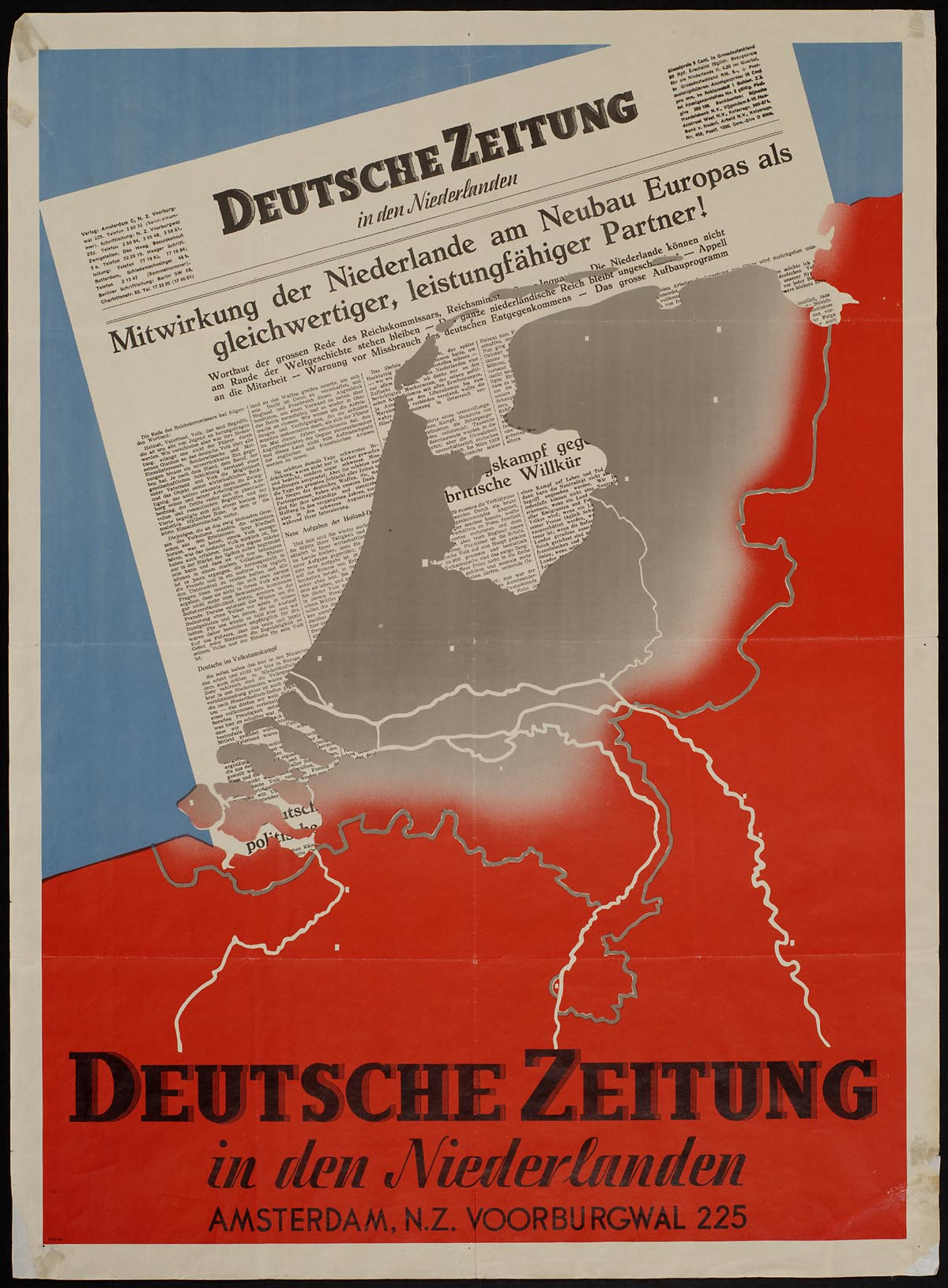 Affiche: "Deutsche Zeitung in den Niederlanden. Mitwirkung der Niederlande am Neubau Europas als gleichwertiger, leistungsfähiger Partner!"